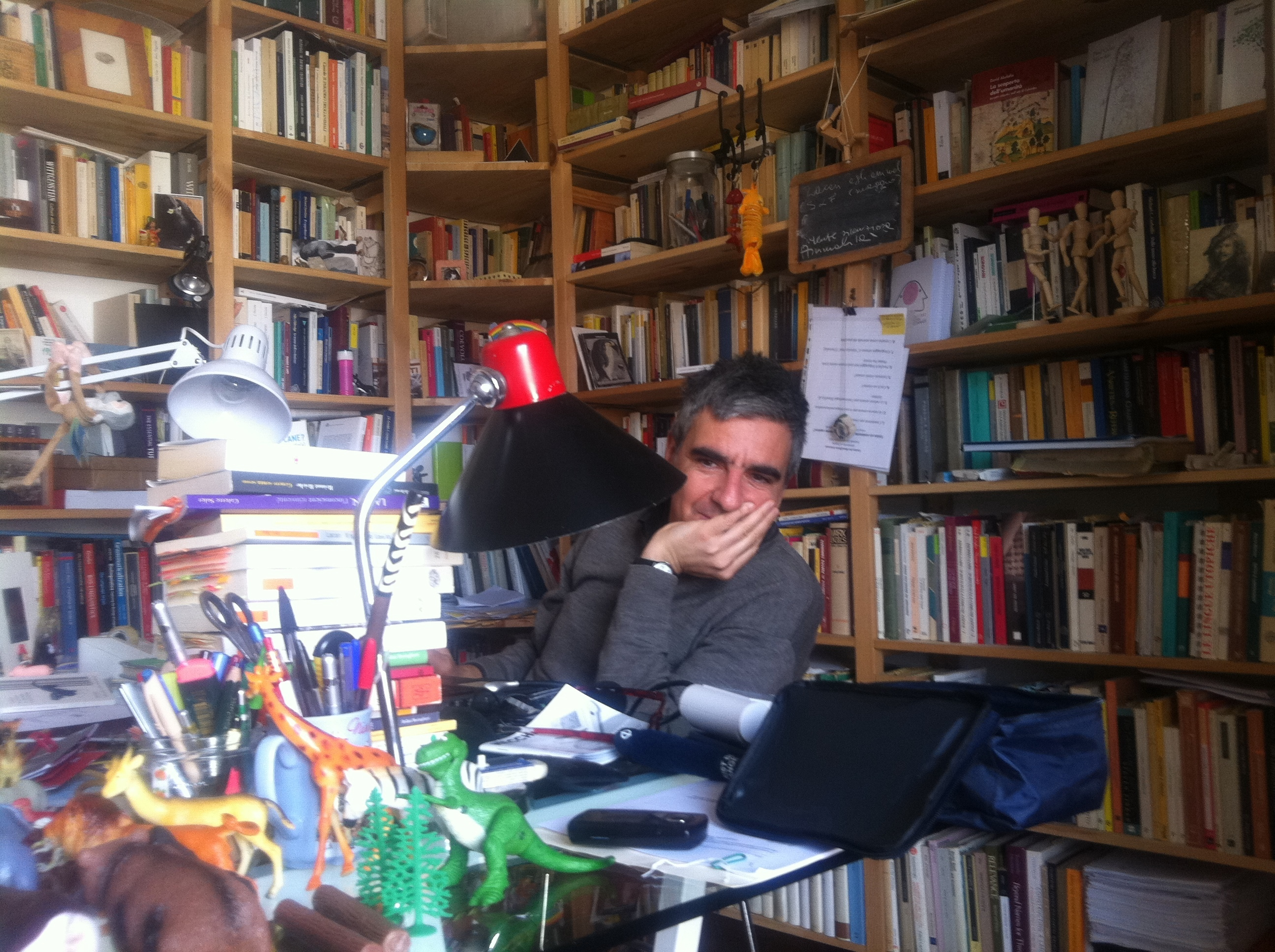 Felice Cimatti nel suo studio